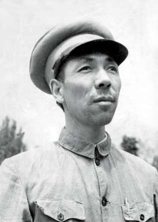 中国人民解放军第四军军长王世泰